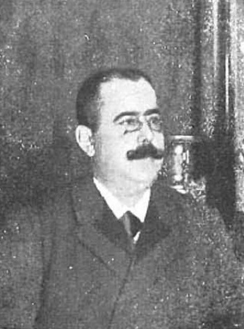 Ramón Larroca, Gobernador Civil de Barcelona.